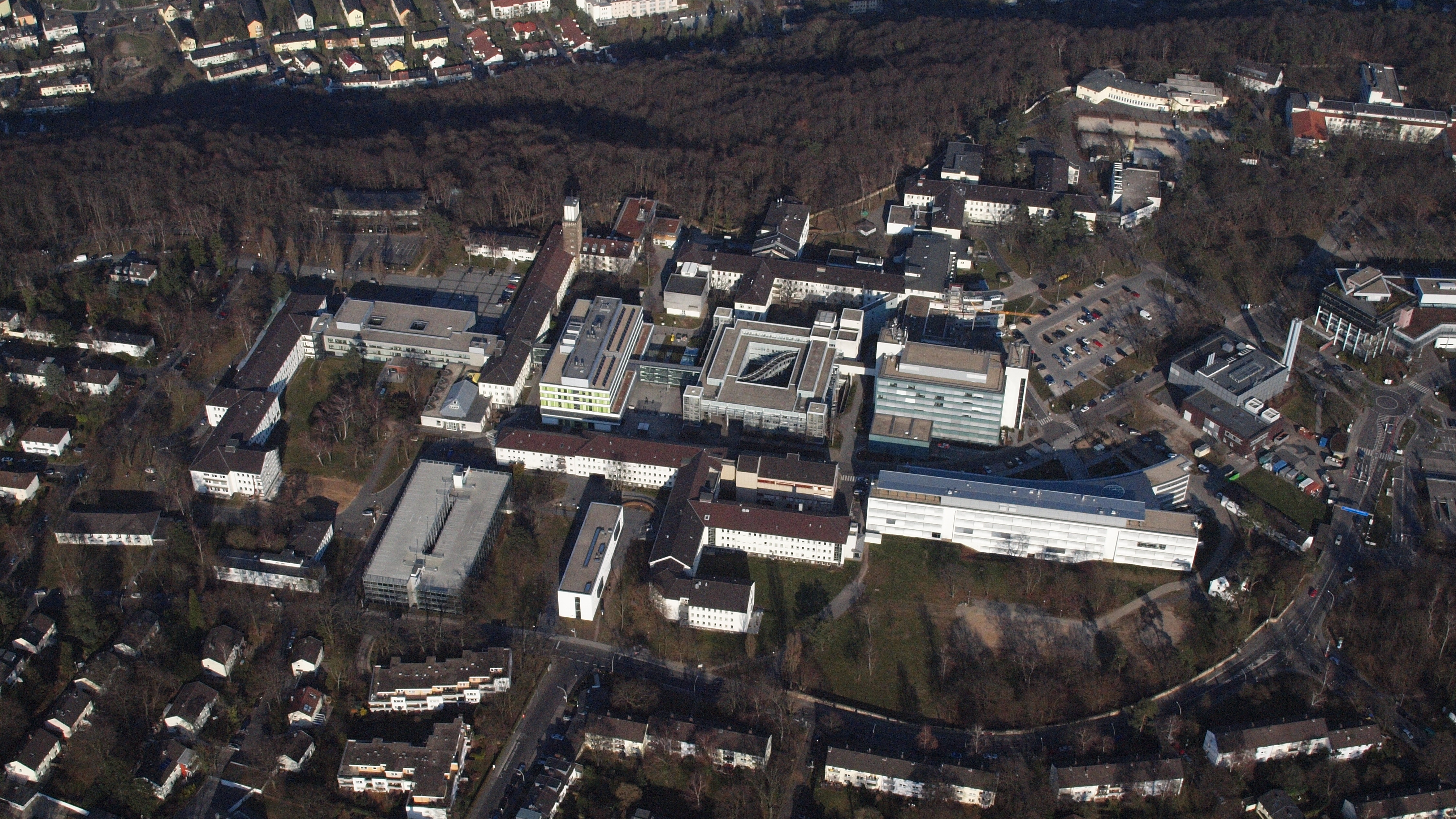 Venusberg, Universitätsklinikum Bonn: nördlicher Bereich, von Westen aus gesehen